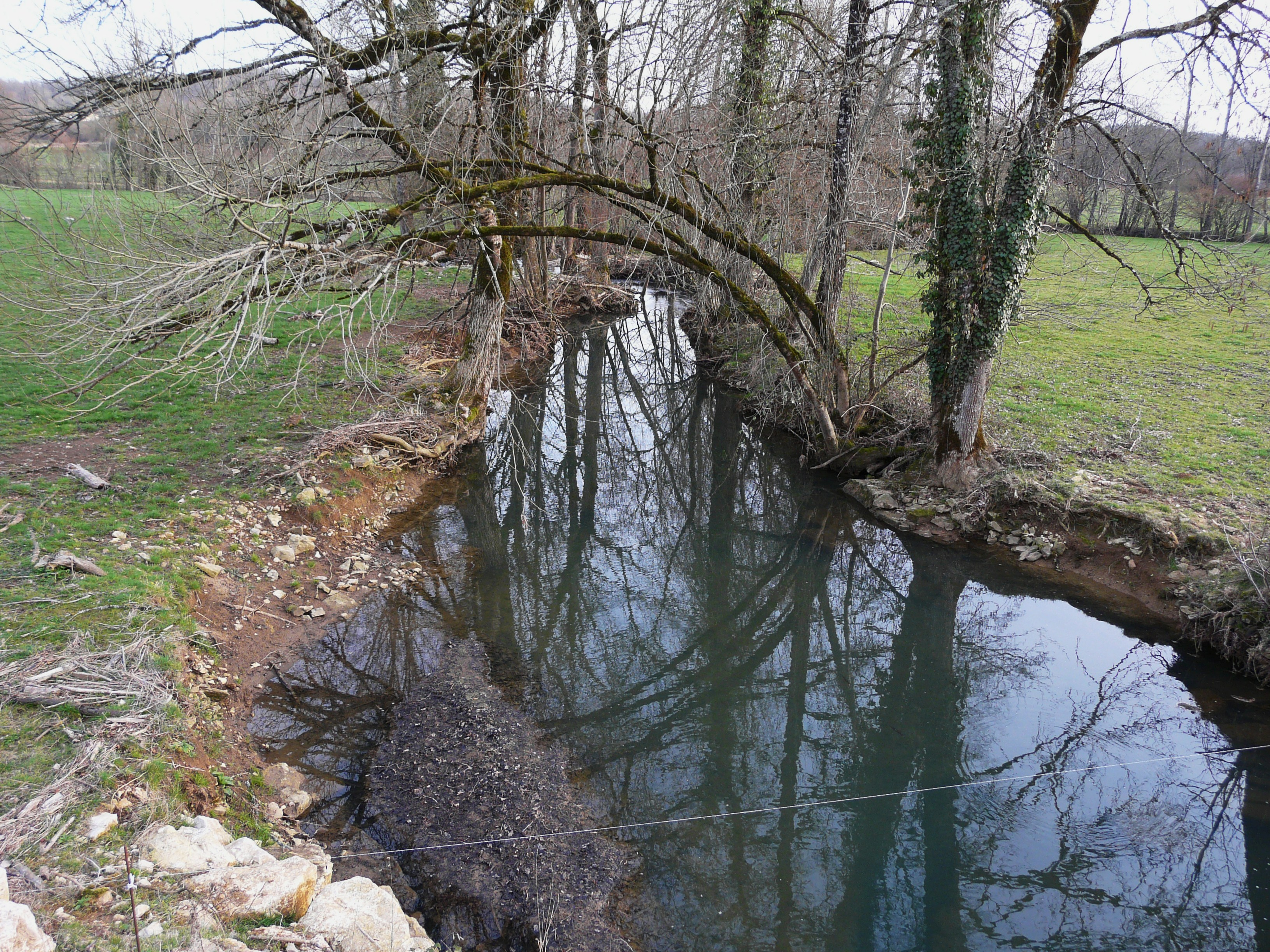 Ruisseau le Ravillou au pont de la RD 705, vue vers l'aval, en limite de Saint-Pantaly-d'Excideuil (à gauche) et Coulaures (à droite), Dordogne, France